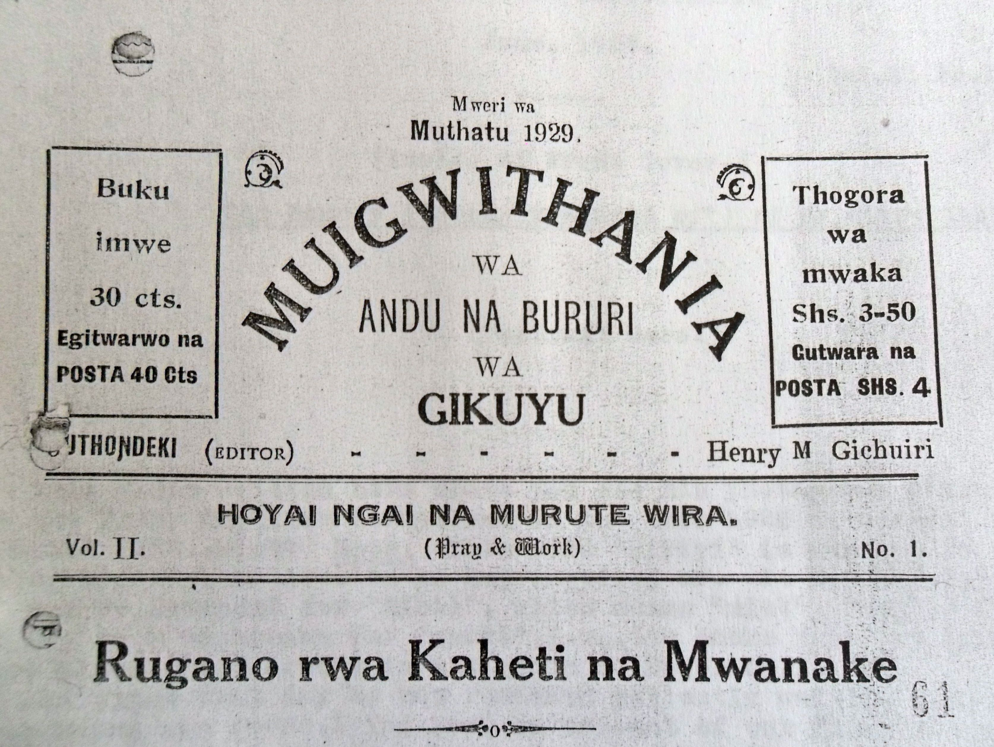 Erste Seite einer Ausgabe der Muigwithania, erschienen 1929 in Kenia